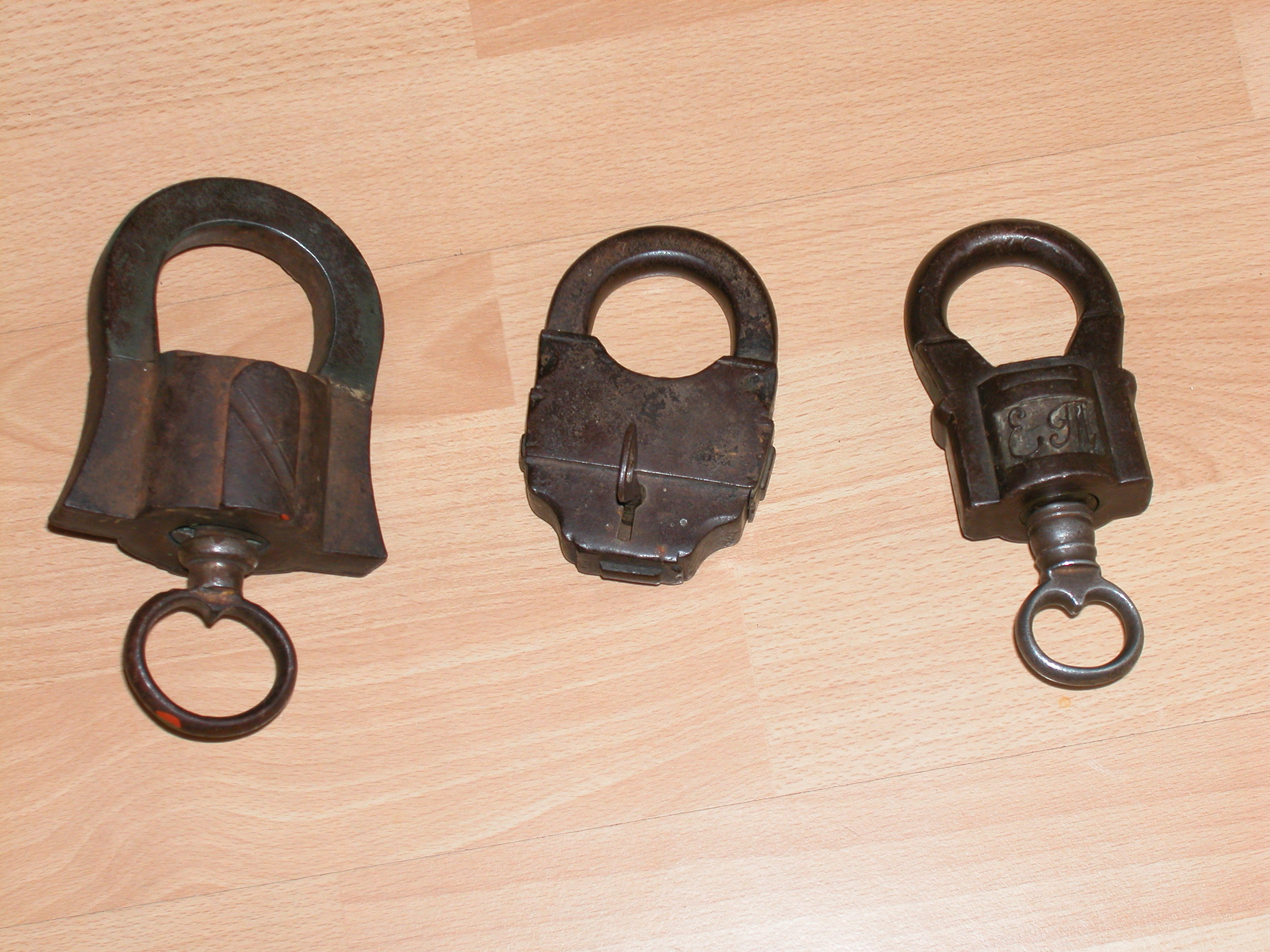 Замки